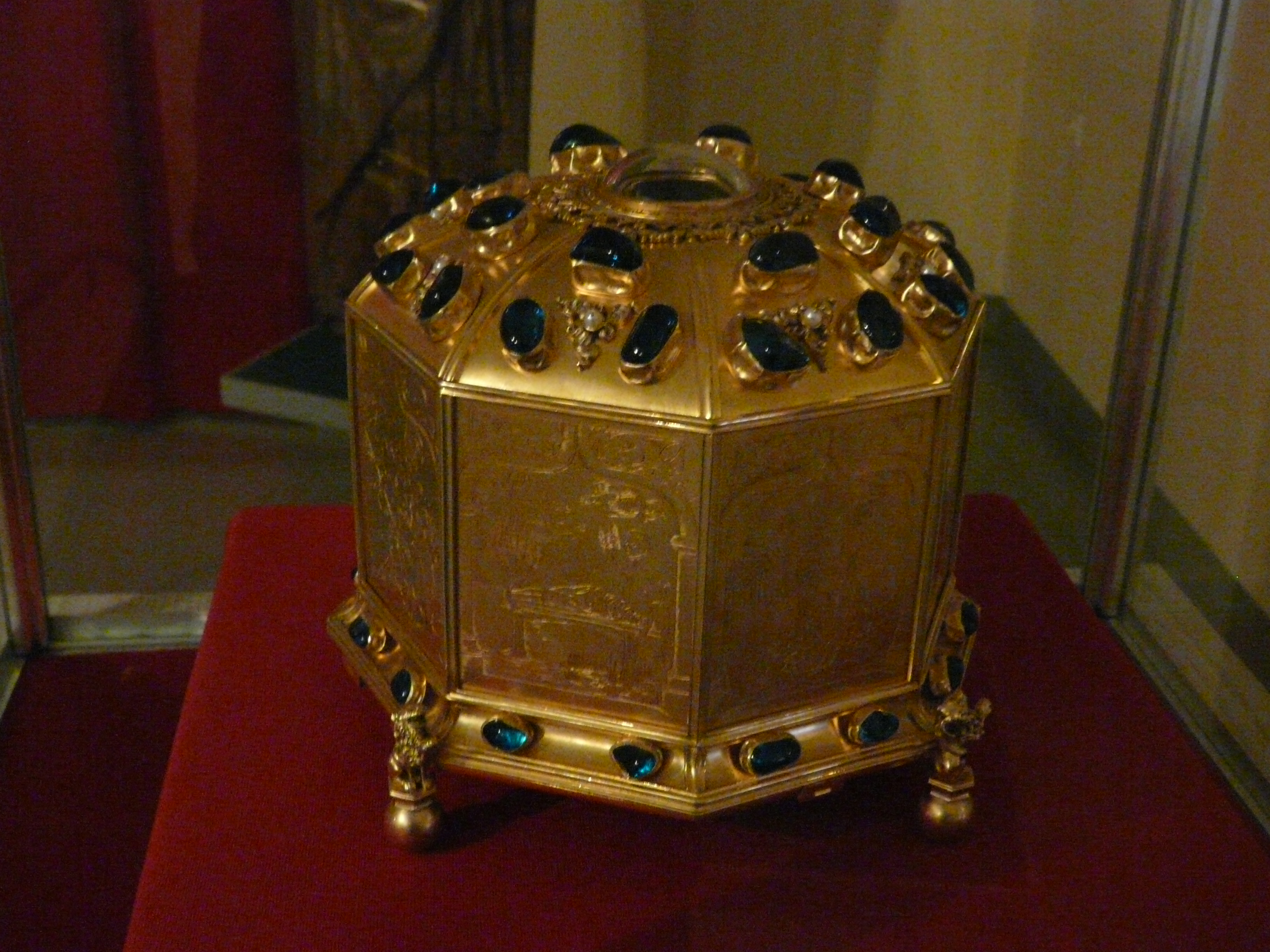 Museum of Archdiocese in Gniezno Relikwiarz na głowę sw. Wojciecha. KOPIA oryginały skradzionego w 1923 r. sporządzona z okazji 1000-lecia śmierci św. Wojciecha w 1977 r. Srebro, złocone, odlewane, repulsowane.